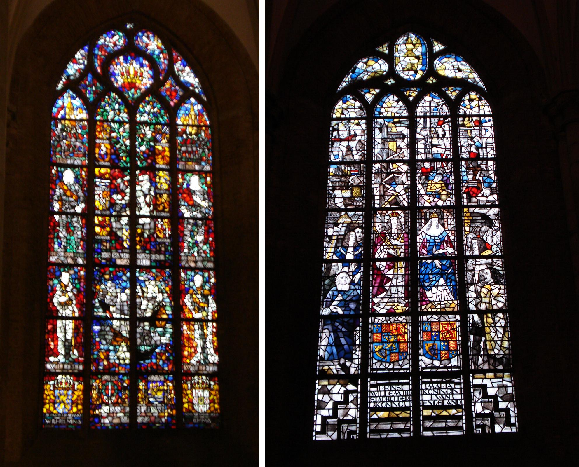 Delft, Nieuwe Kerk. Glas in lood ramen.